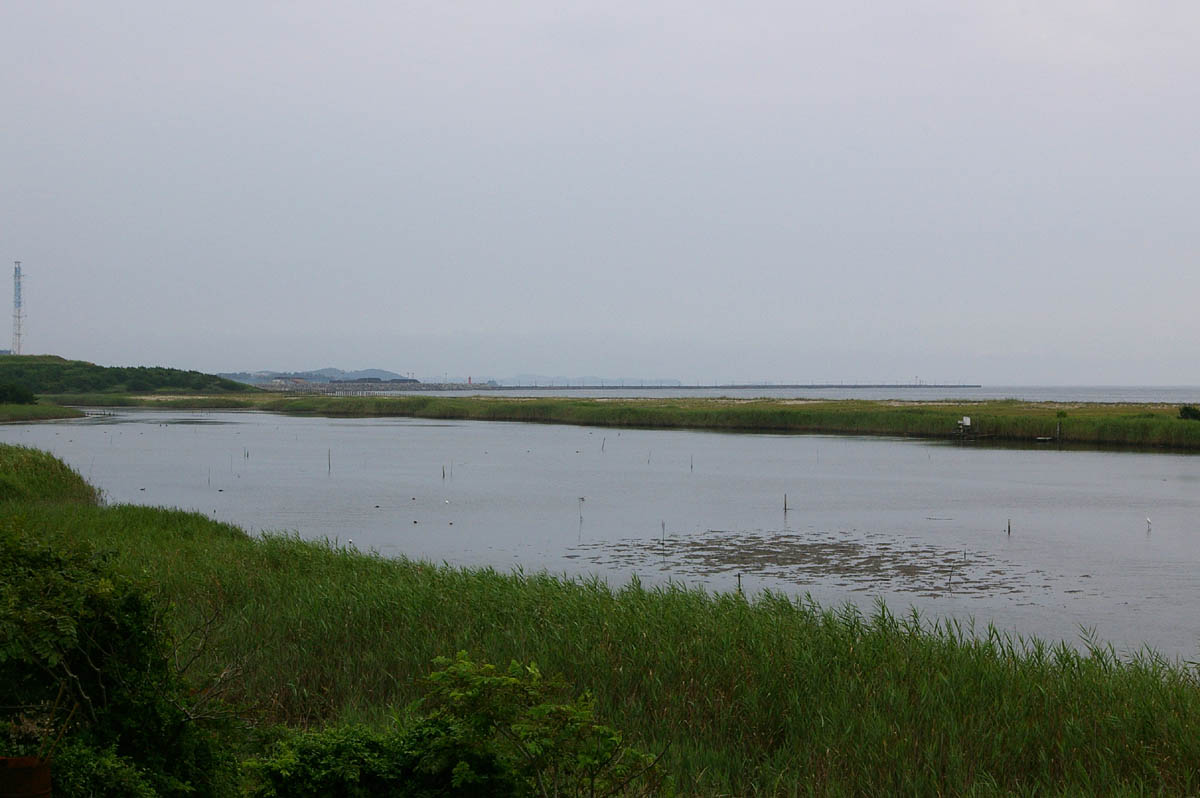 Gamou tidal flat 日本 宮城県仙台市宮城野区 蒲生干潟